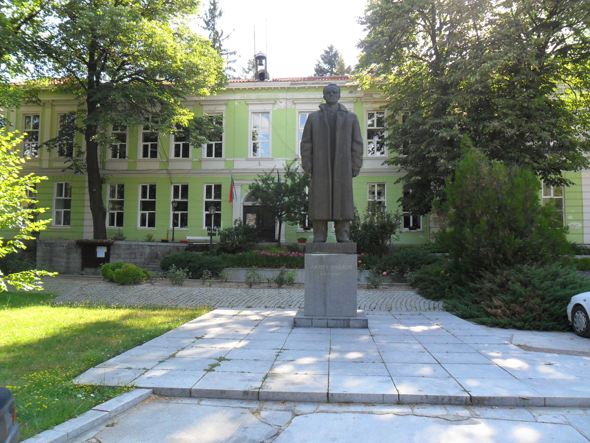 Паметник на Антон Иванов пред общината в Копривщица